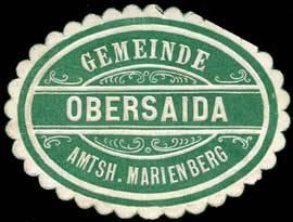 Sealing stamp Title: Gemeinde Obersaida - Amtshauptmannschaft Marienberg Description: grün, weiß, geprägt Place: Obersaida size: 3x4 cm